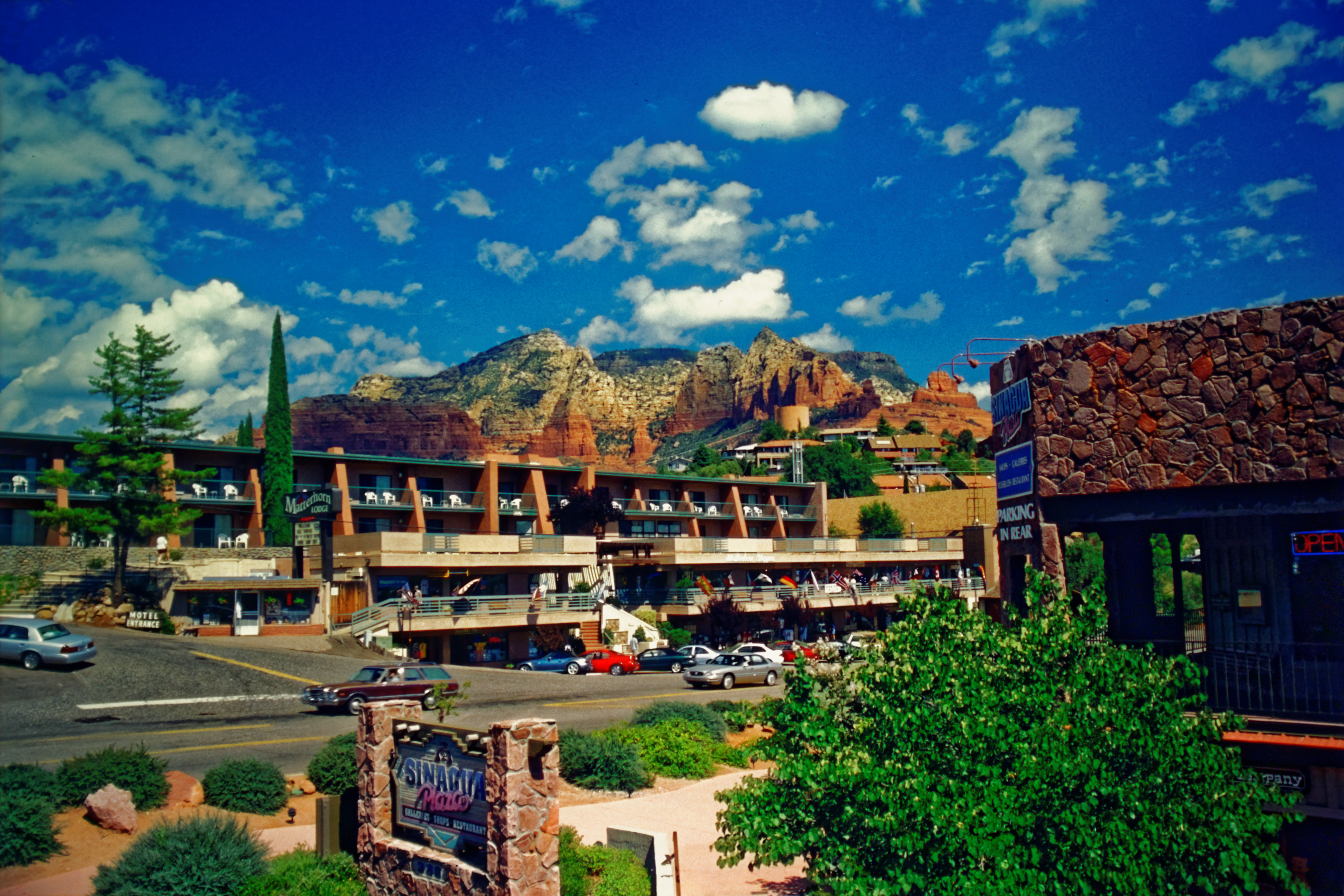 Blick über Sedona in die roten Berge